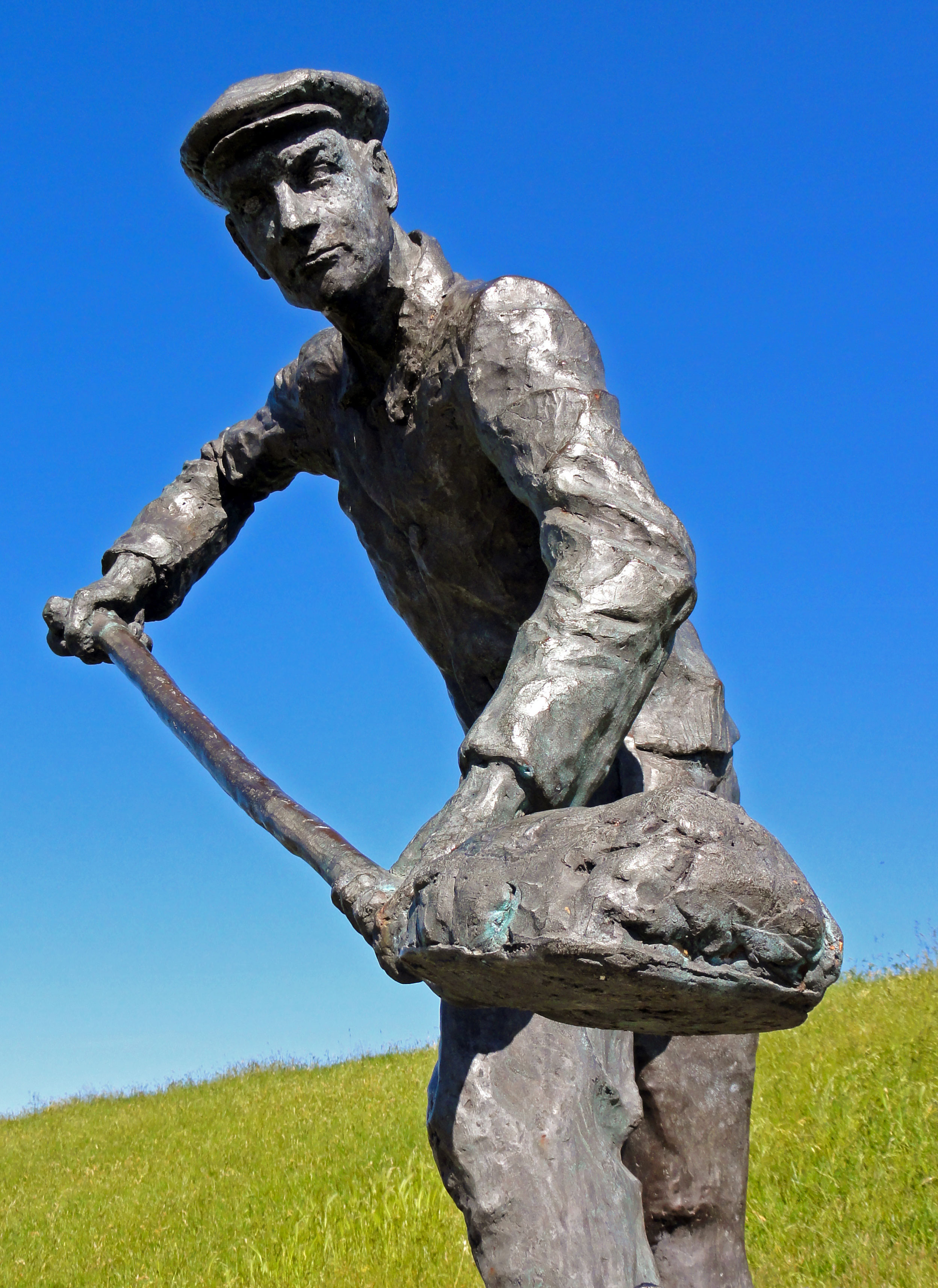 De Slikwerker door Frans Ram in Zwarte Haan